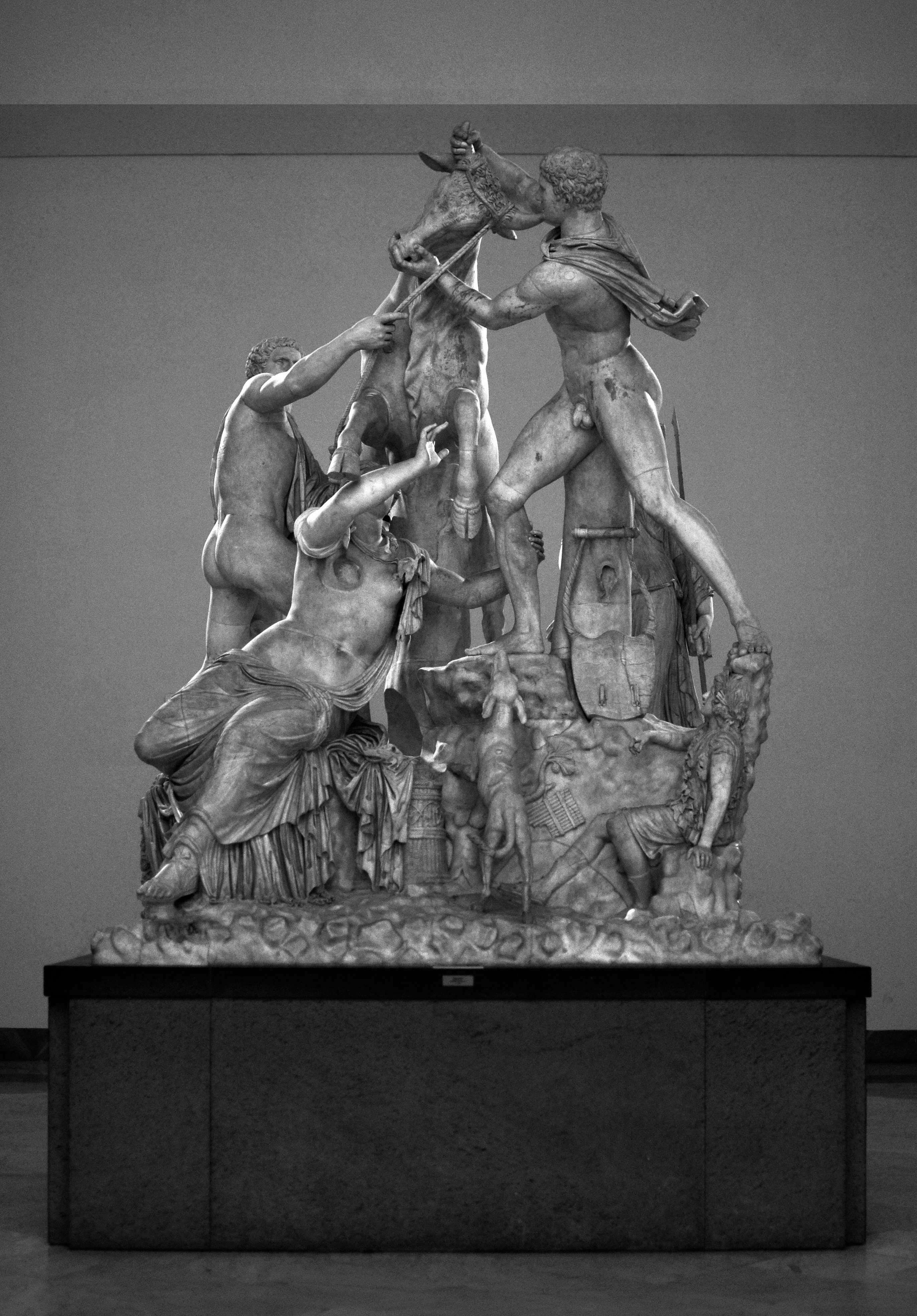 Toro de Faresio, Escultura griega helenística, Museo de Nápoles, Italia